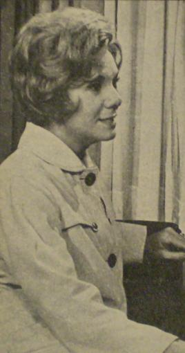 Iris Lainez